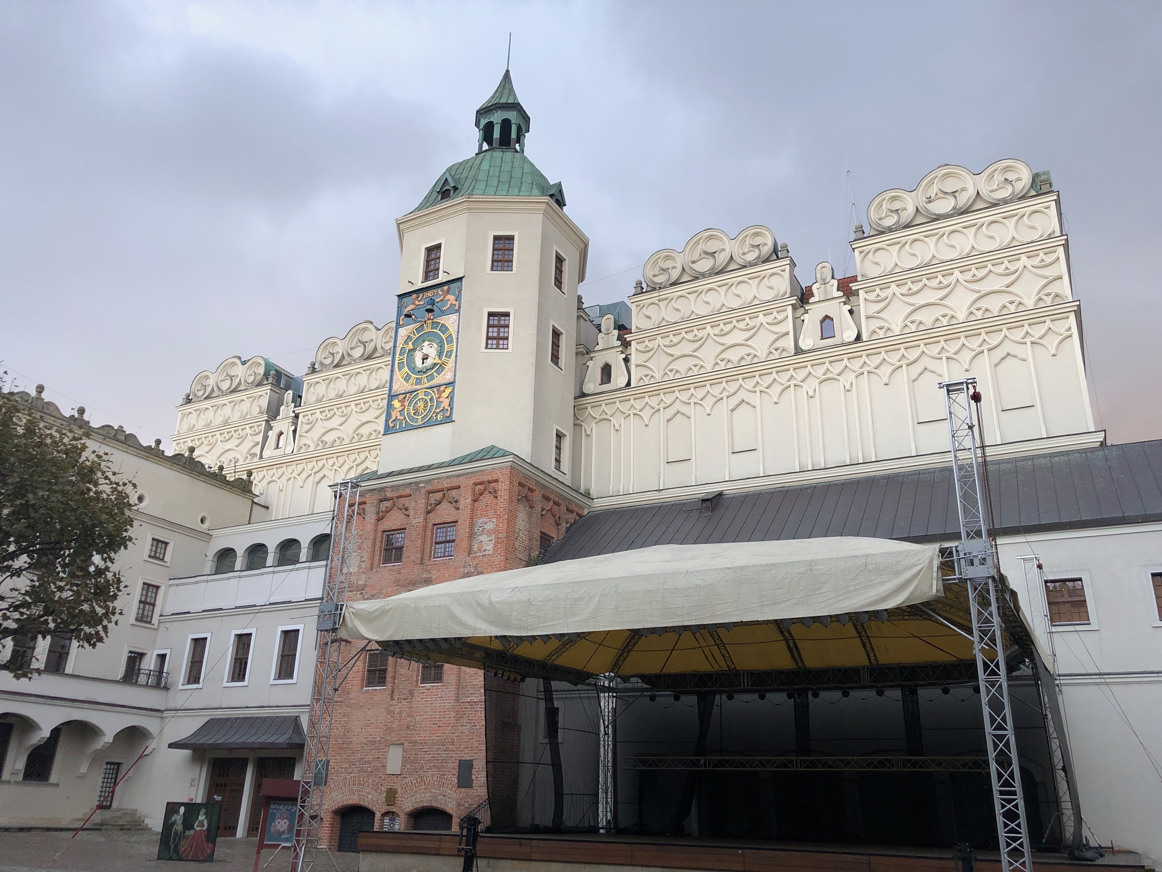 Замок Поморских князей